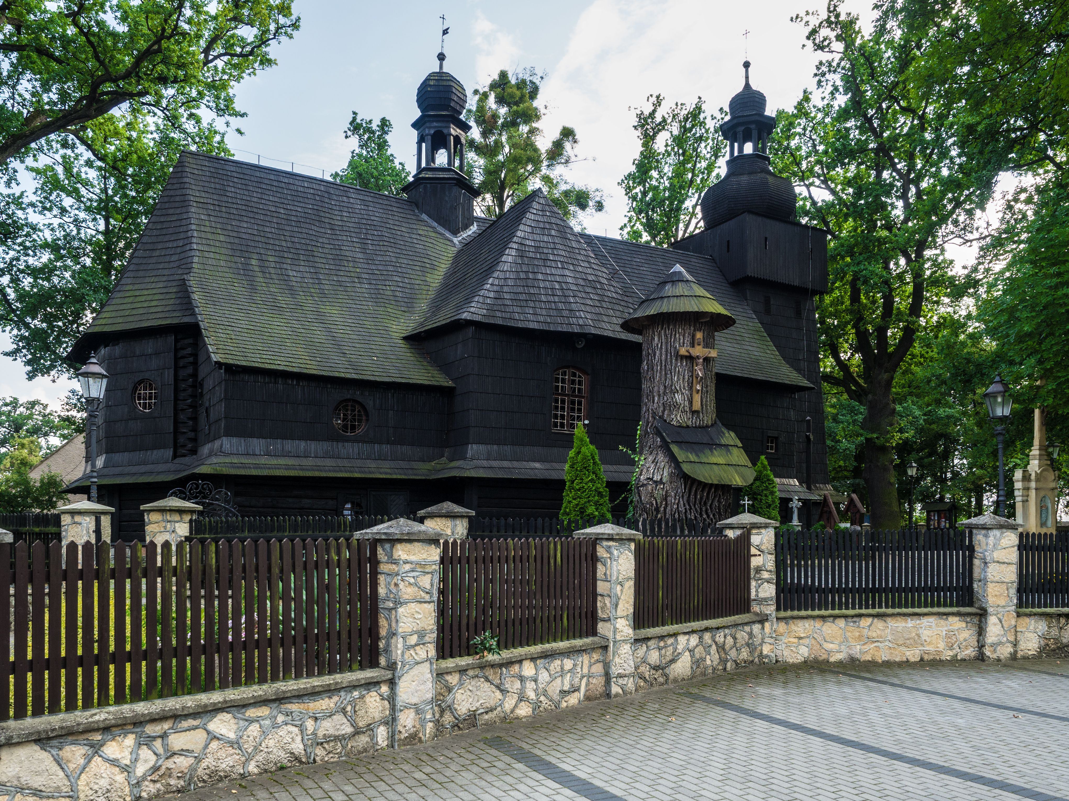 Bierdzany, kościół par. p.w. św. Jadwigi, 1711